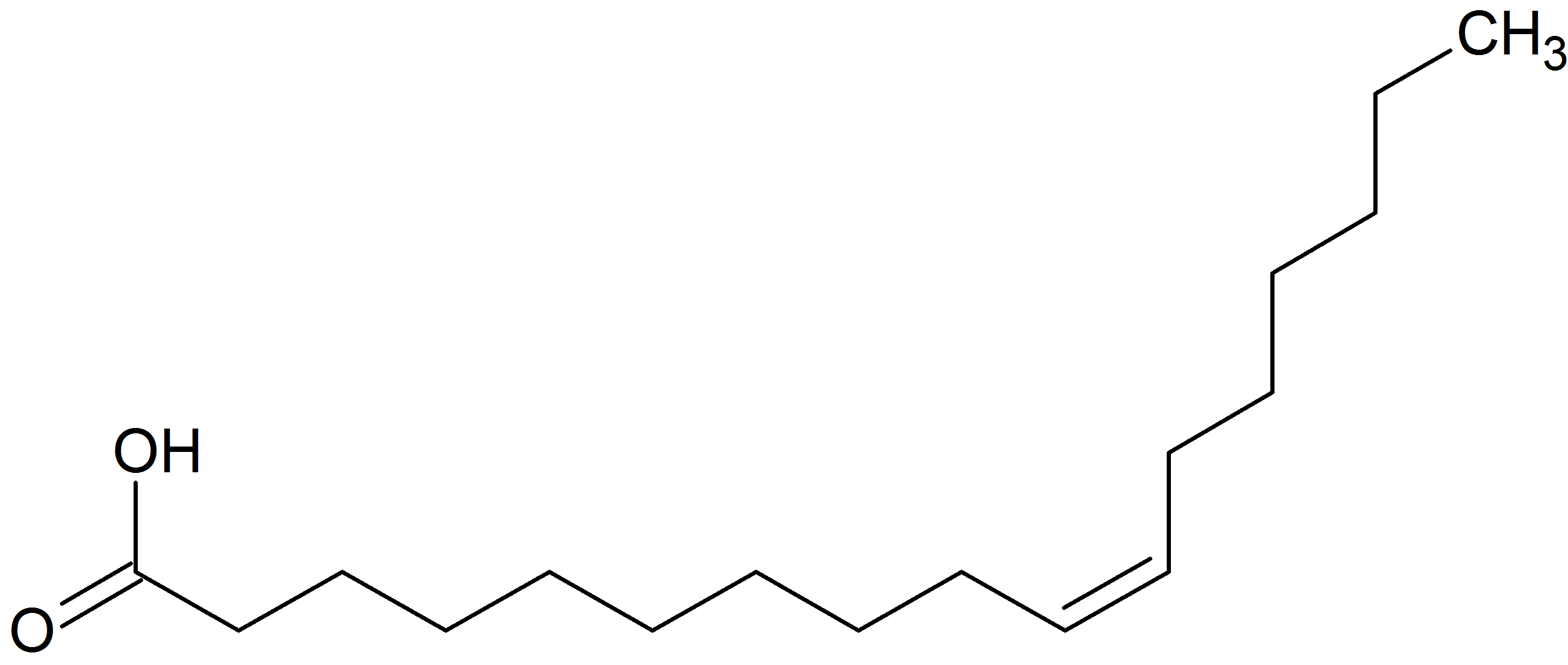 cis-10-Heptadecenoic acid - CAS 29743-97-3